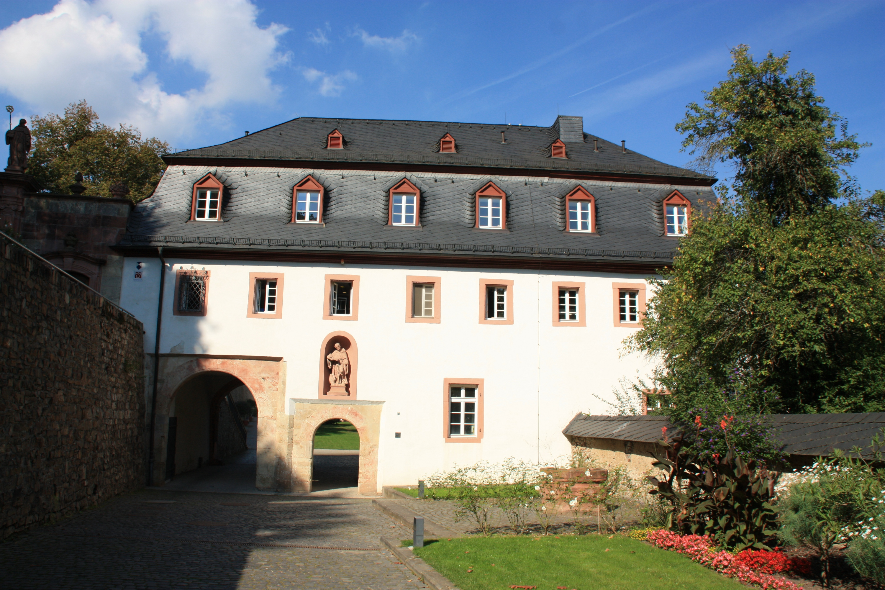 Kloster Eberbach, Torhaus und Haupteingang zum Kloster